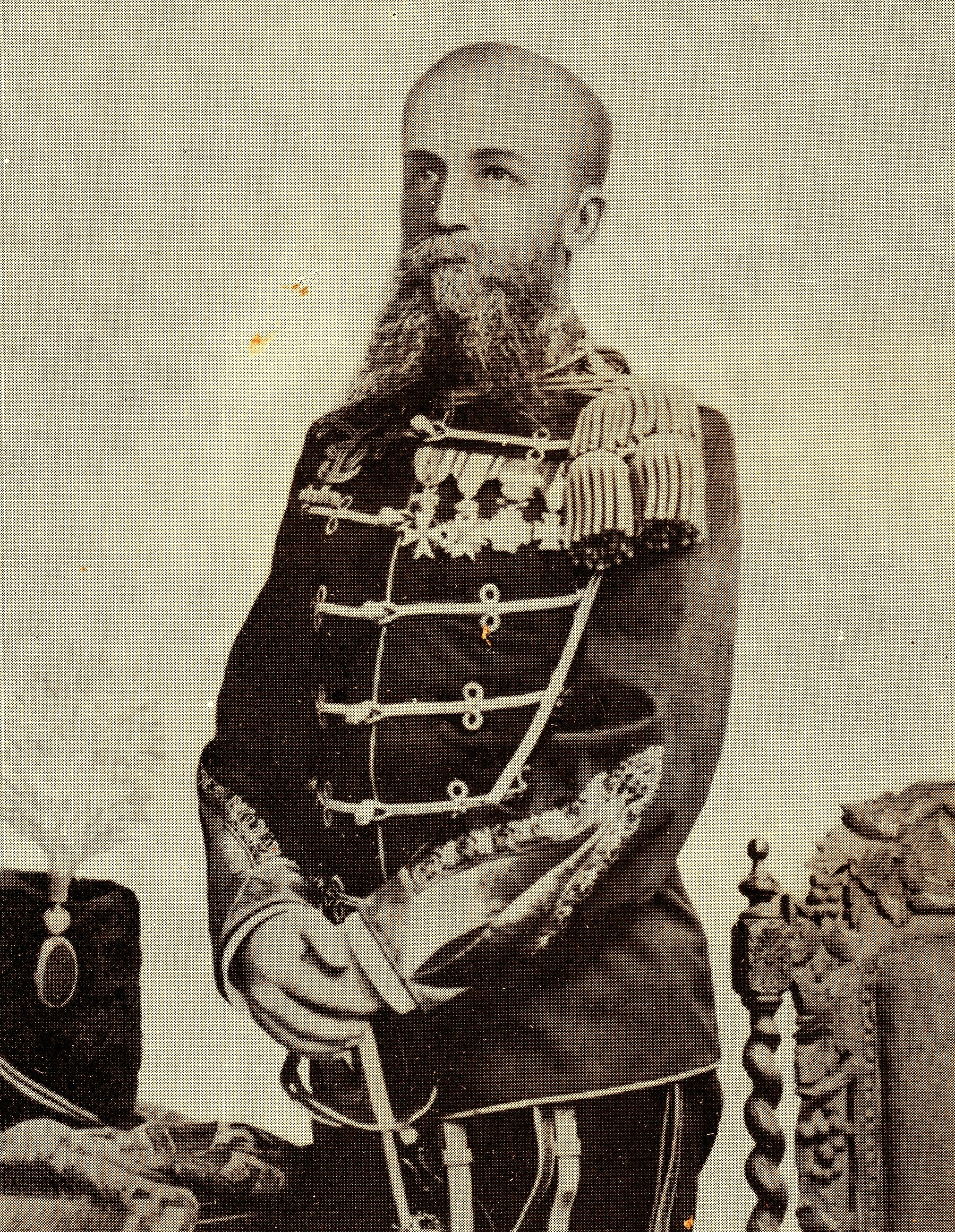 Generaal L. Swart